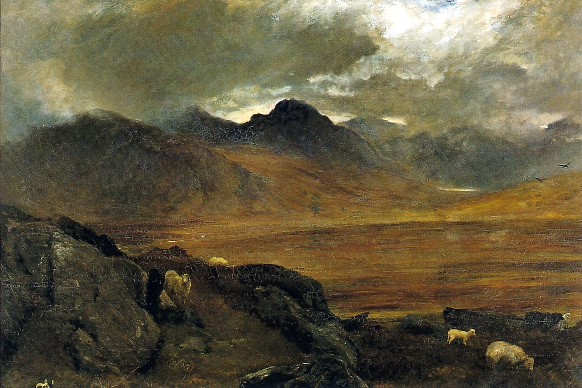 Snowdonia